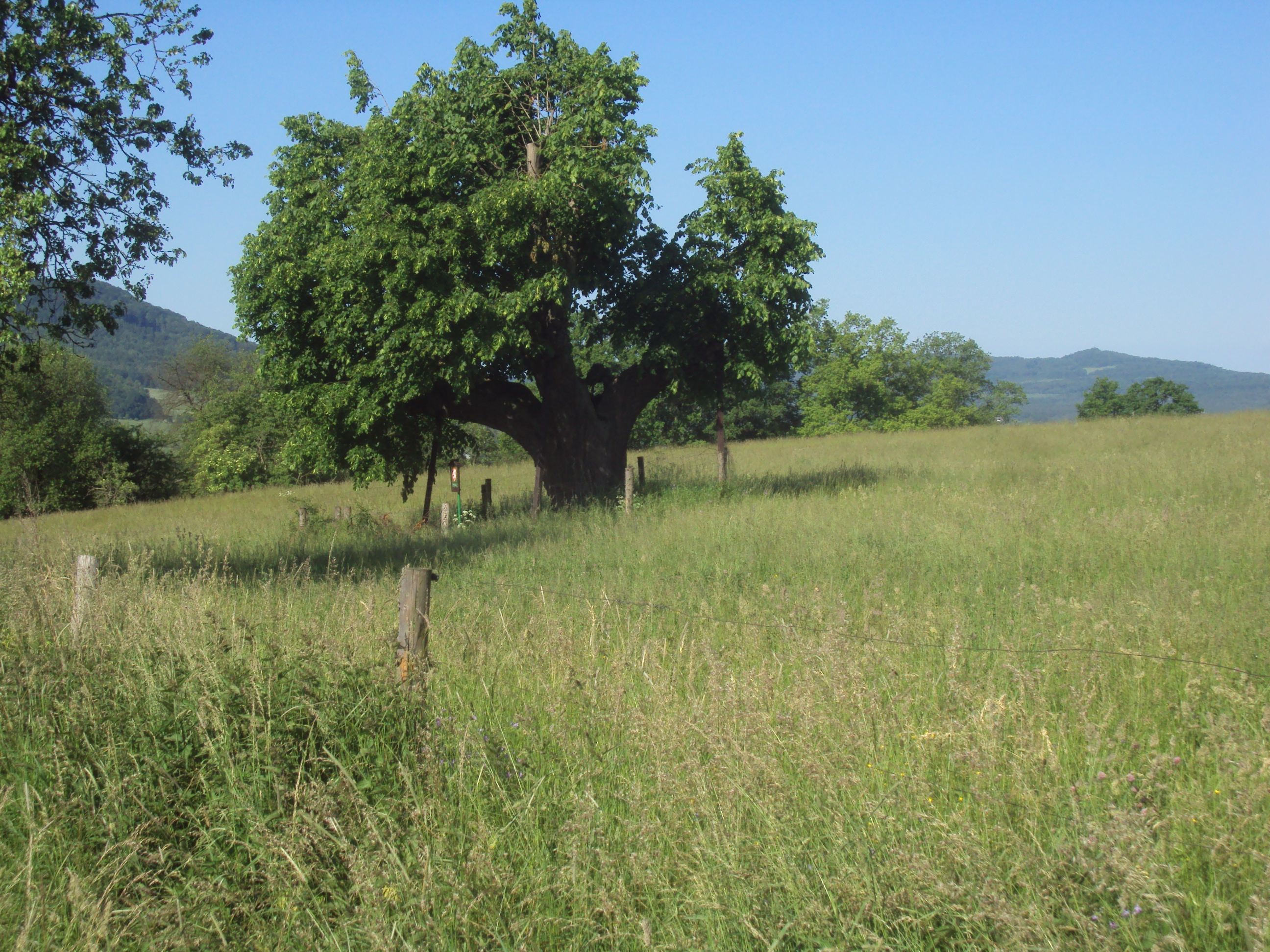 Památný strom u Stružnice, při silnici do Libchavy